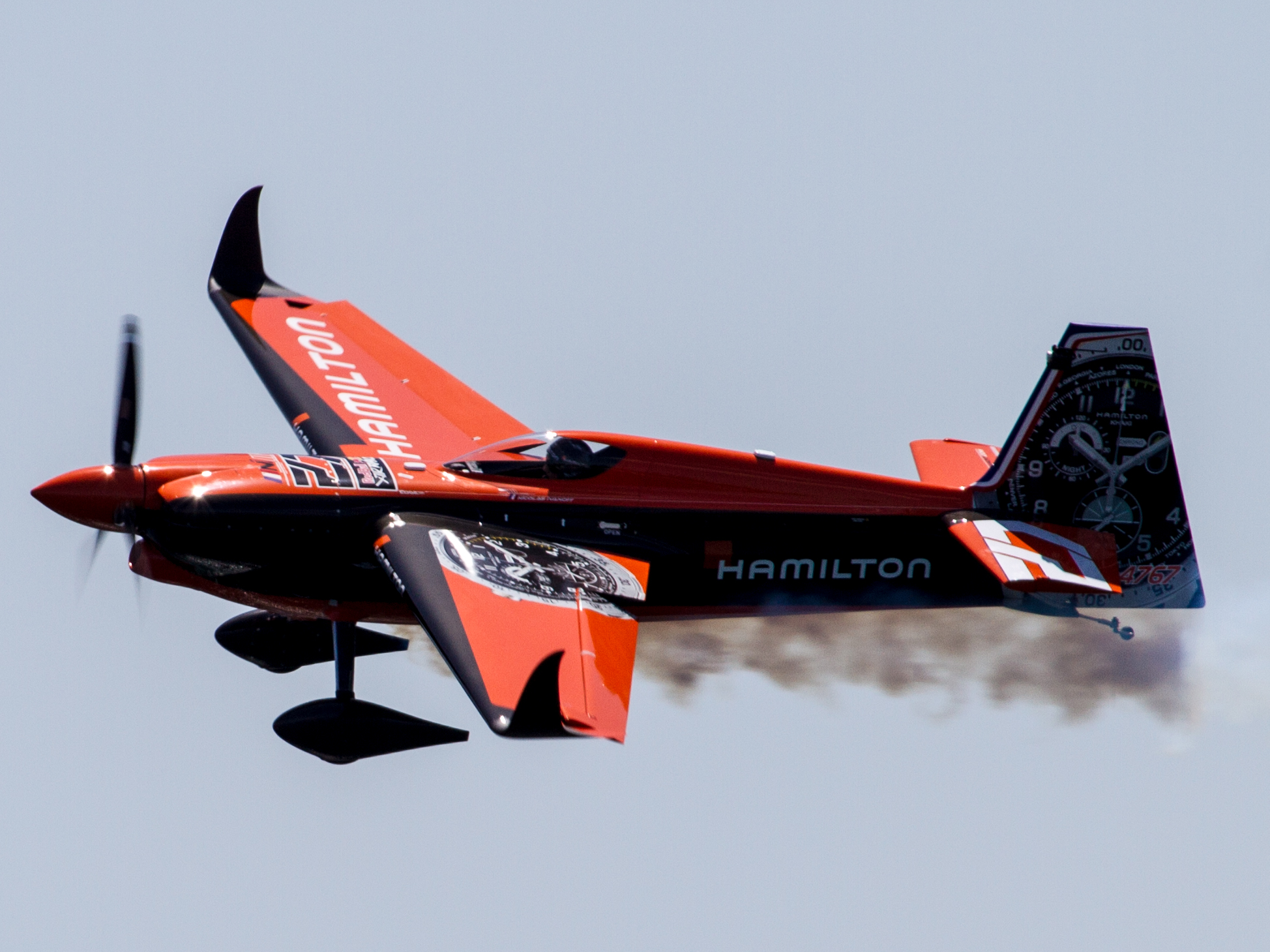 2017年レッドブル・エアレース・ワールドシリーズ 千葉 ニコラス・イワノフ(フランス)の機体